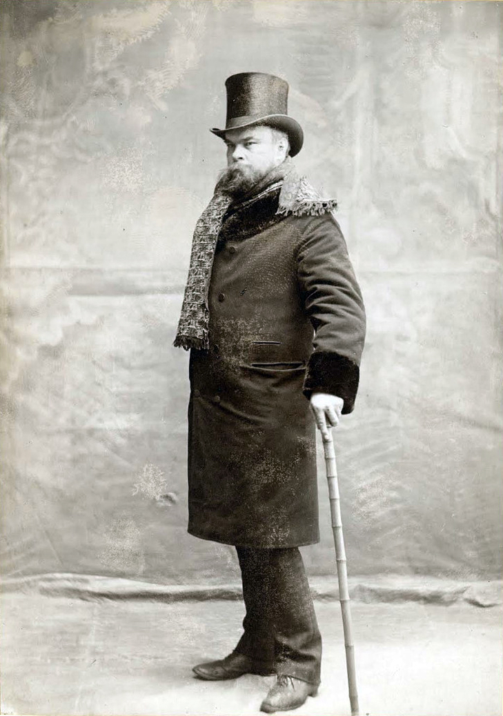 Photographie de Paul Verlaine en manteau, haut de forme et écharpe de Charvet.